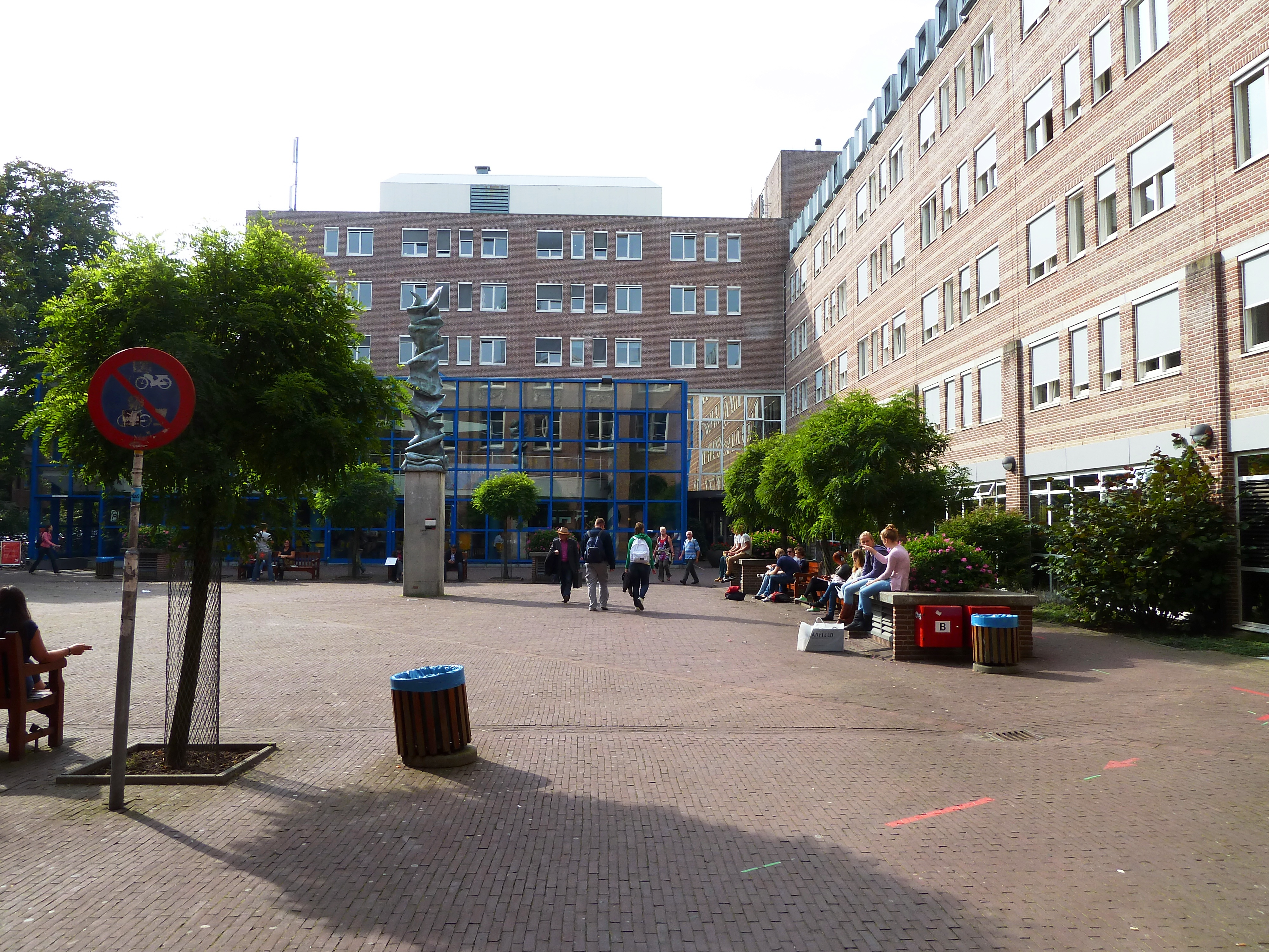 De Harmonie in Groningen, binnenplaats.